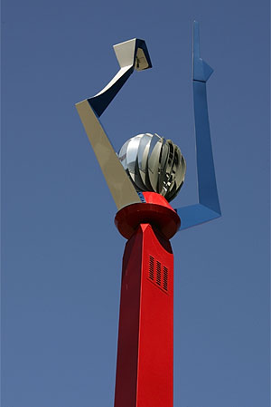 Boudry: Obélisque Marat (Marat l'oeil - par Francis Roulin)